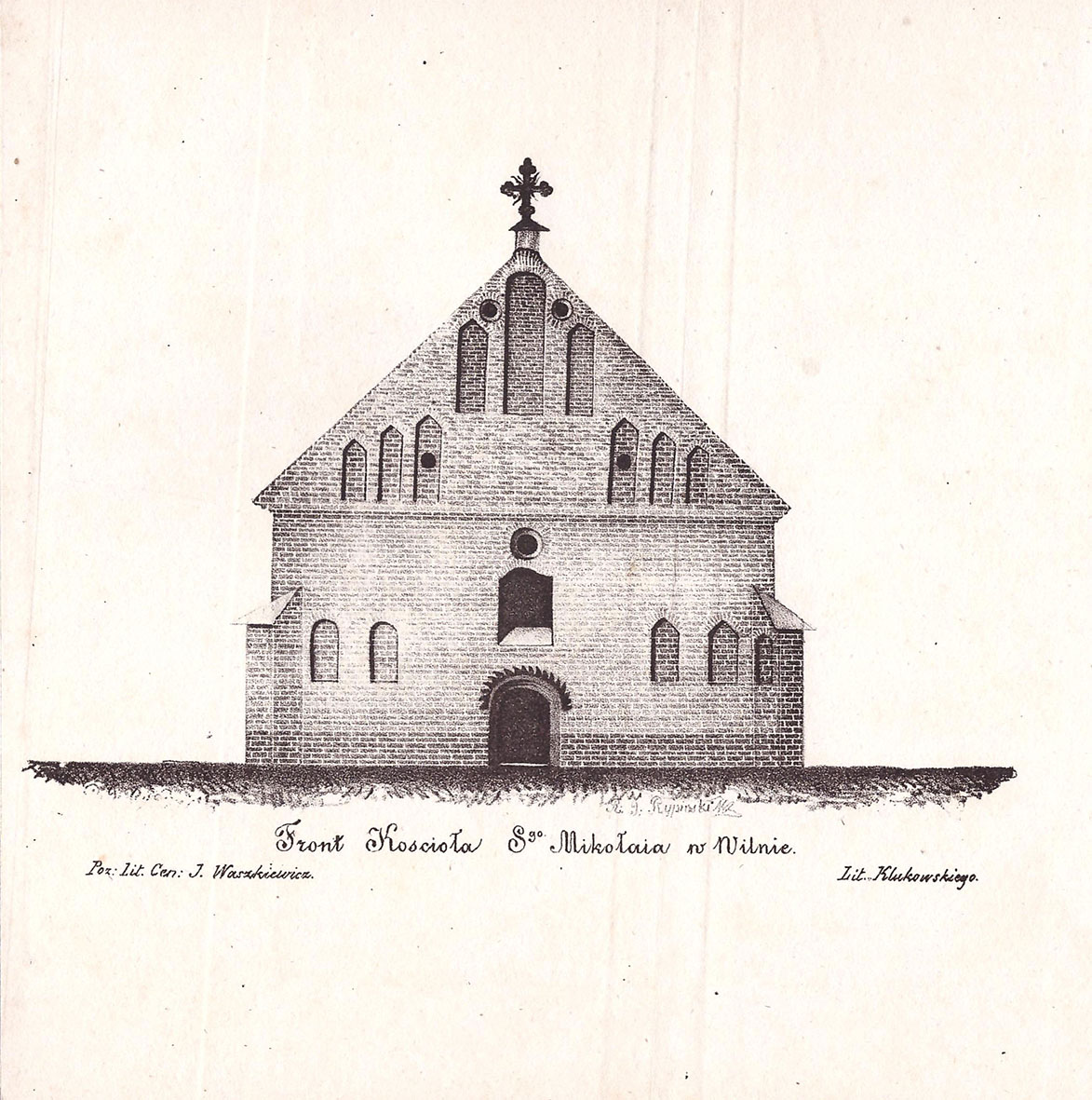 Беларуская (тарашкевіца): Вільня (Vilnia), вуліца Сьвятога Мікалая (vulica Śviatoha Mikałaja). Касьцёл Сьвятога Мікалая